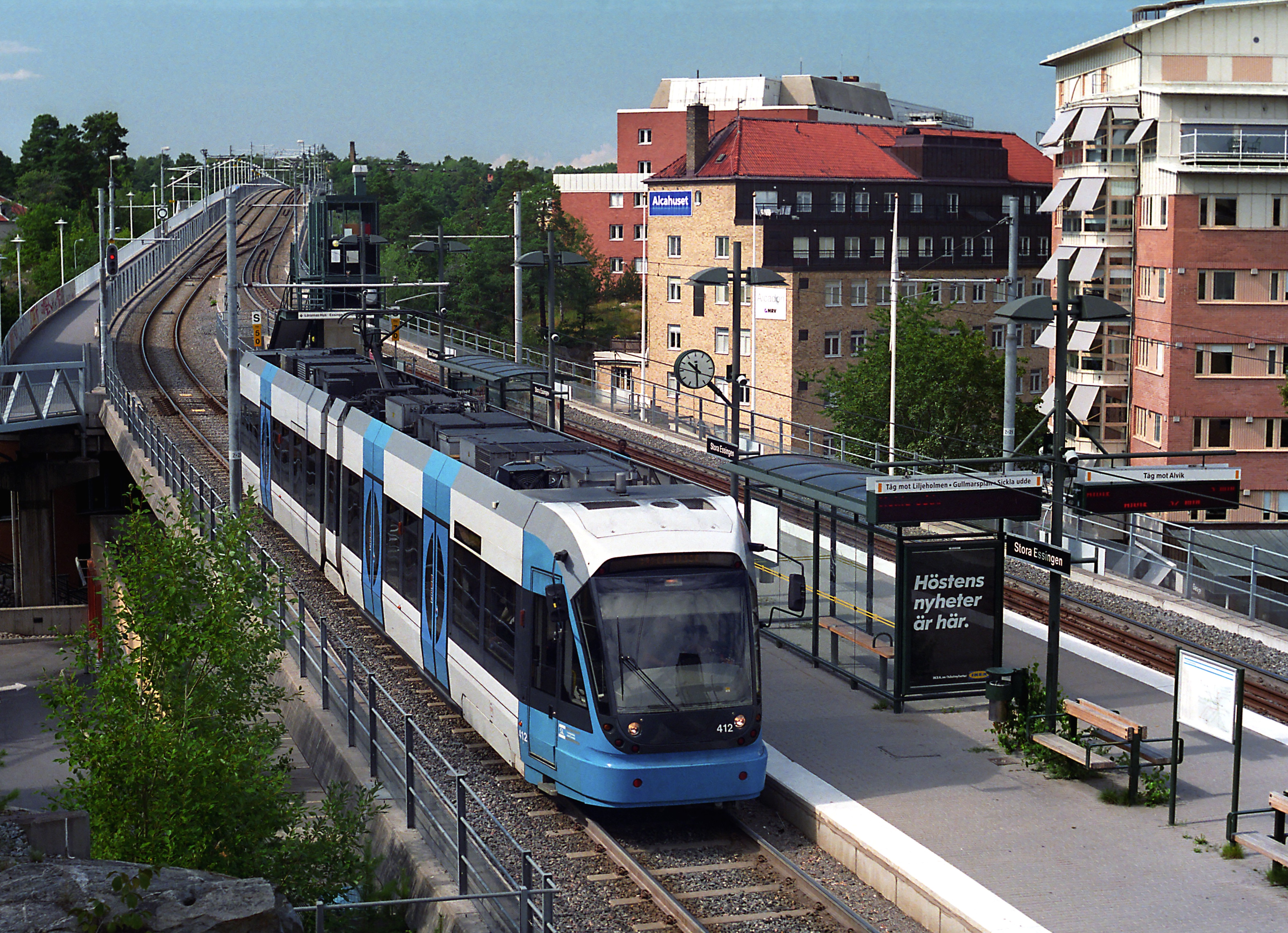 Zug nach Sickla Udde, dahinter die für die Tvärbana neugebaute Alviksbro nach Alvik